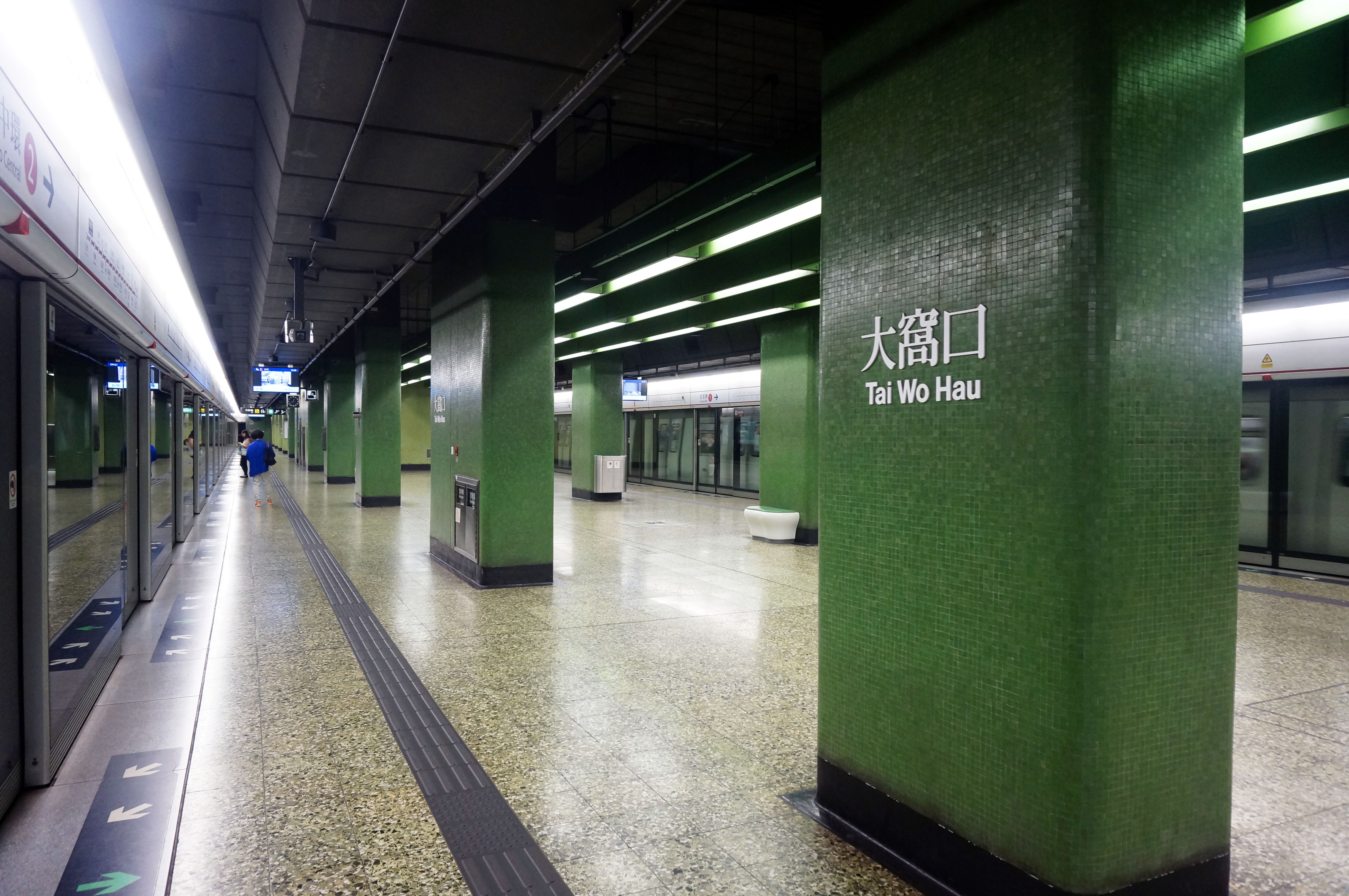 港鐵大窩口站